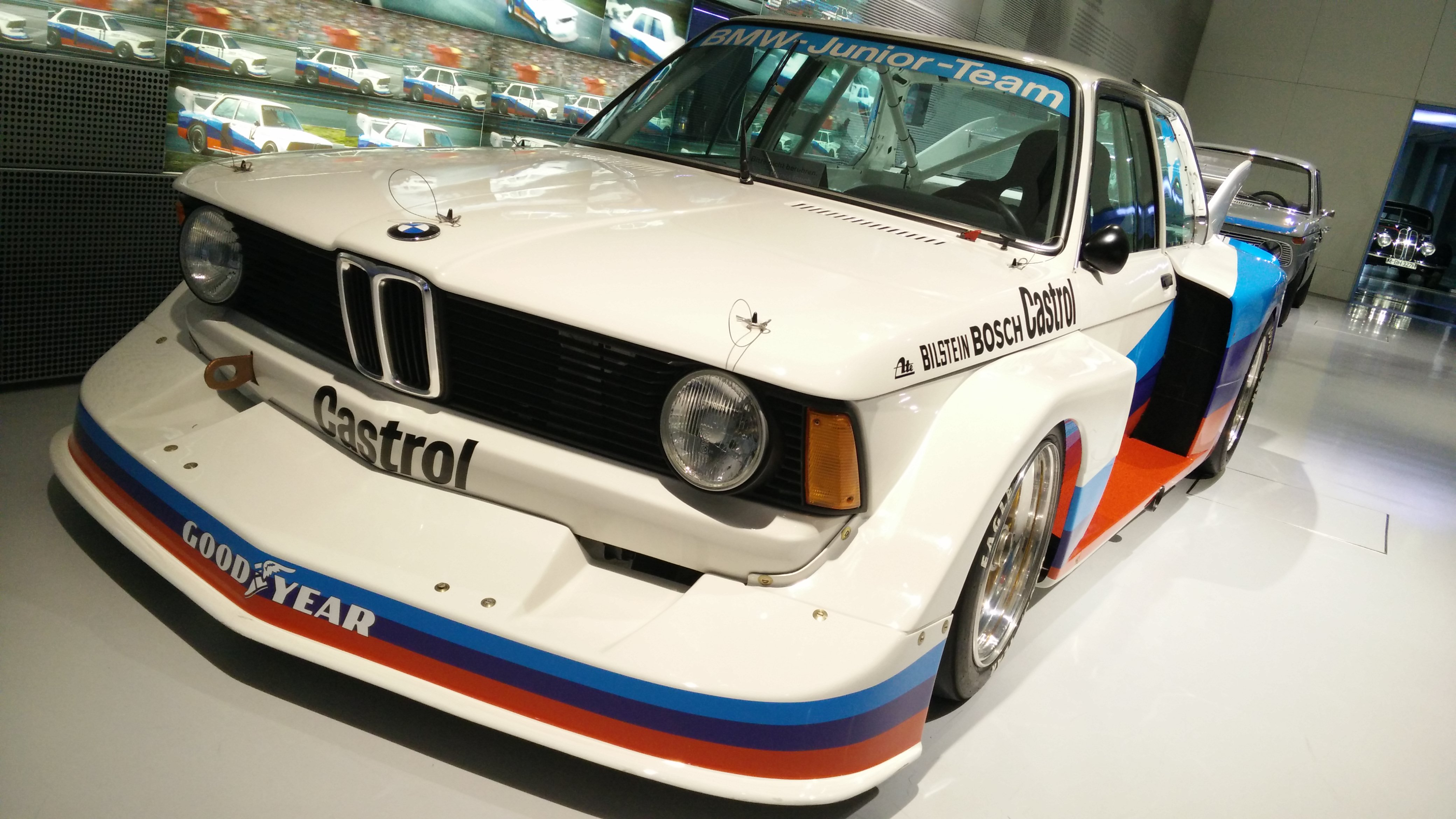 IMG_20141113_115931